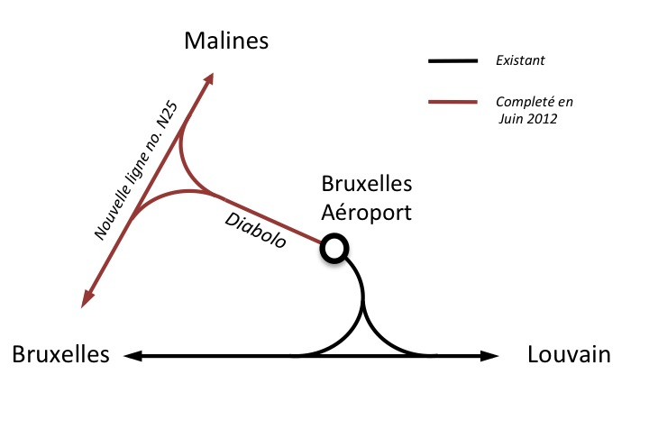 Plan du projet Diabolo